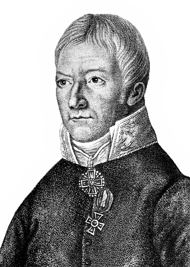 Академик Василий Михайлович Севергин (1765-1826)